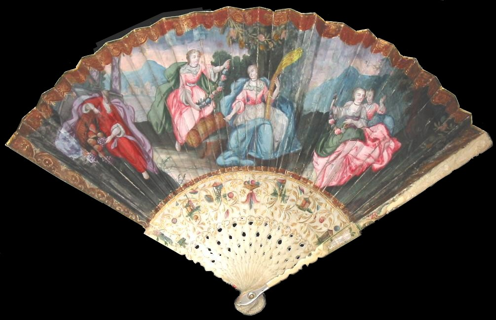 Eventail (France ?) ca 1700, double feuille peau gouachée, monture ivoire, panaches avec application d'écaille et de nacre.